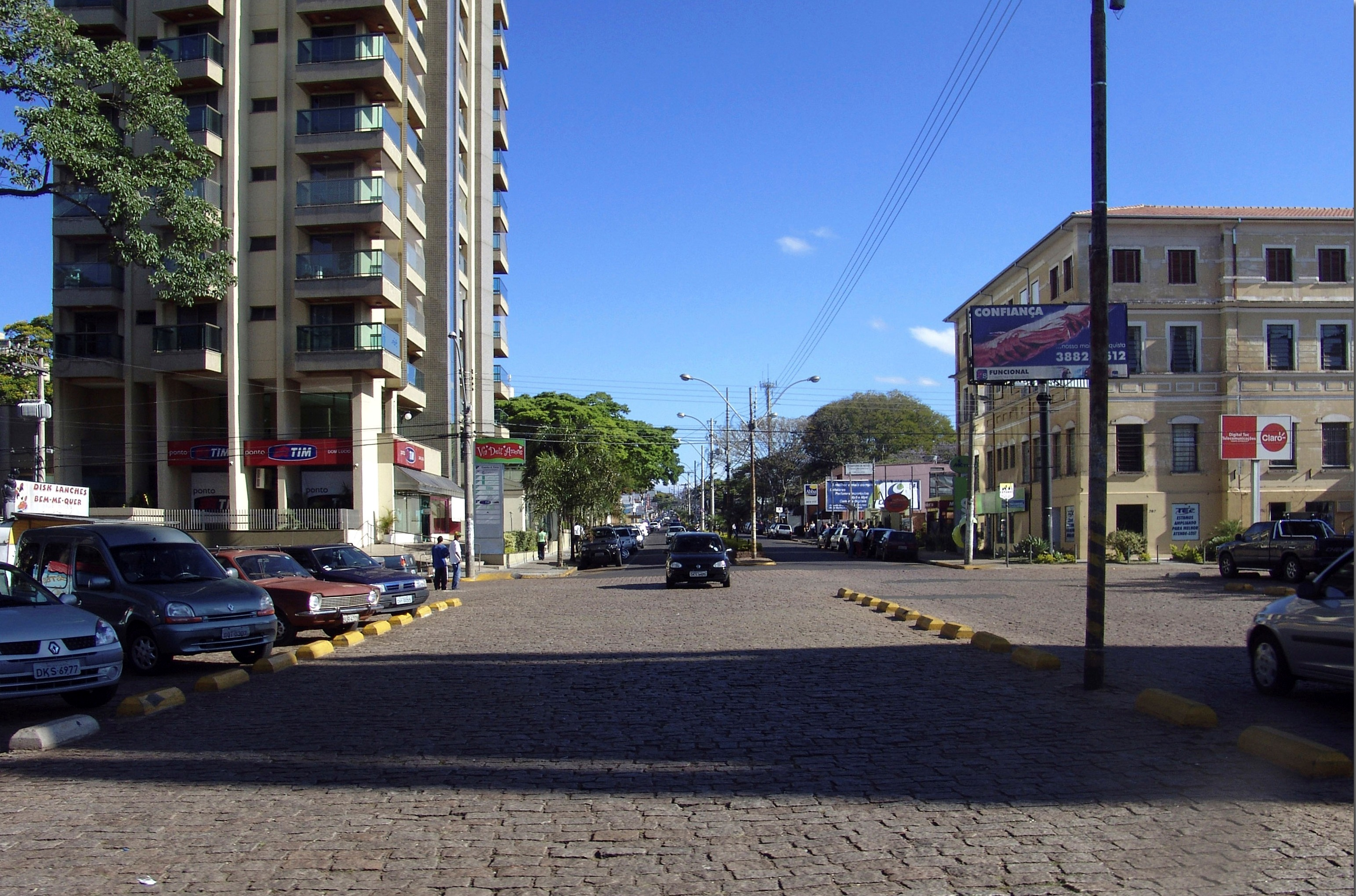 Vista da cidade de Botucatu (avenida D. Lúcio), São Paulo, Brasil